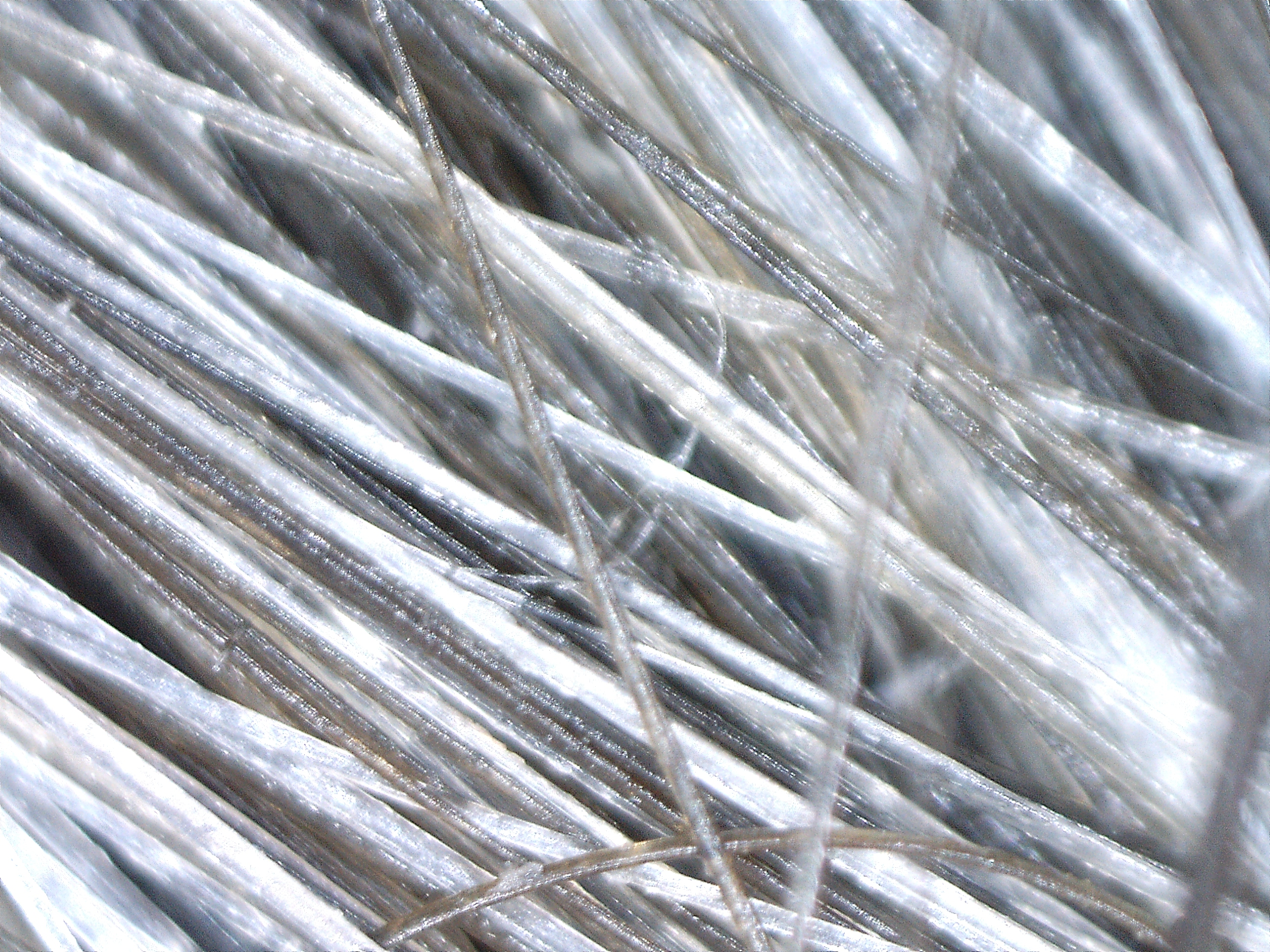 Cheveux blancs (argentés), chez une femme d'environ 50 ans.